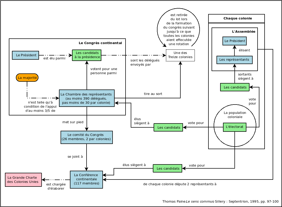 Diagramme représentant la constitution des États-Unis proposée par Thomas Paine dans Common Sense en 1776